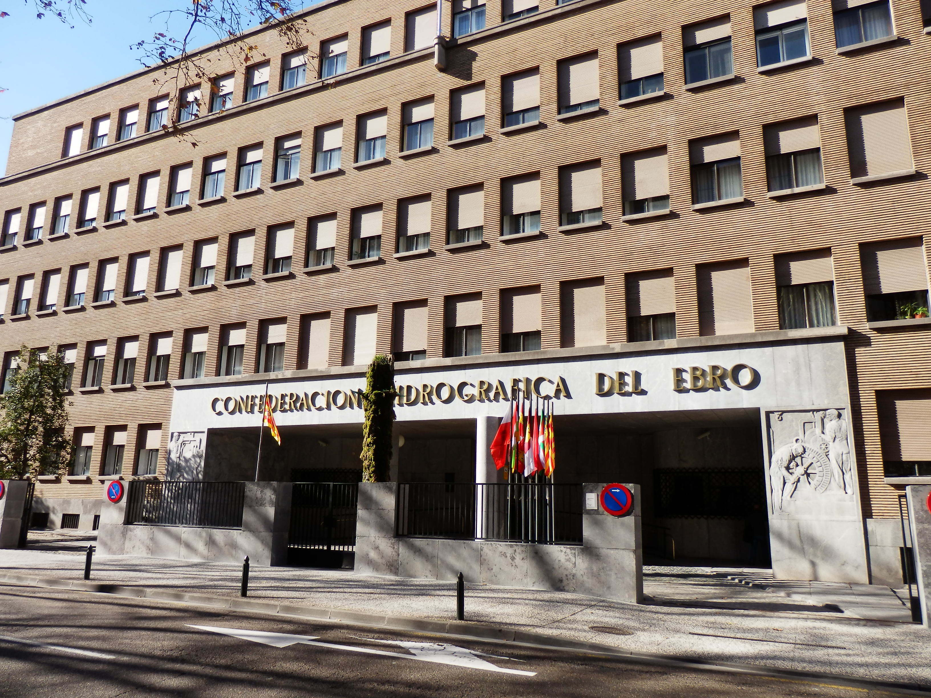 Edificio de la Confederación Hidrógrafica del Ebro.